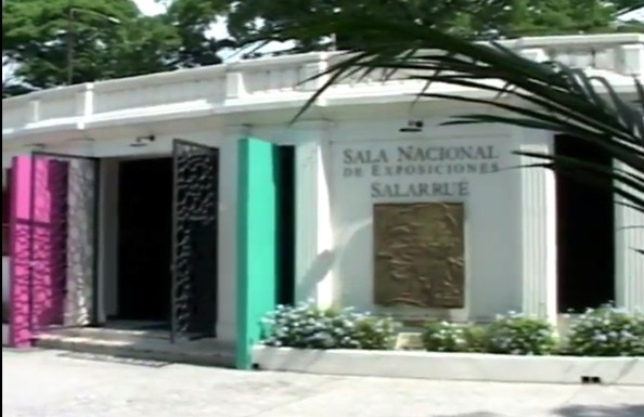 Sala Nacional De Exposiones Salarrue, Situada En El Parque Cuscatlan. San Salvador. Donde Se Encuentran Muchas De sus Obras Artisiticas